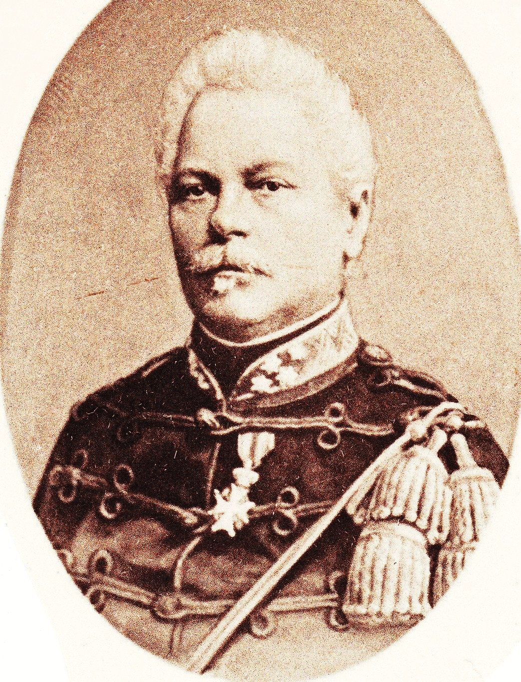 Generaal Kohler